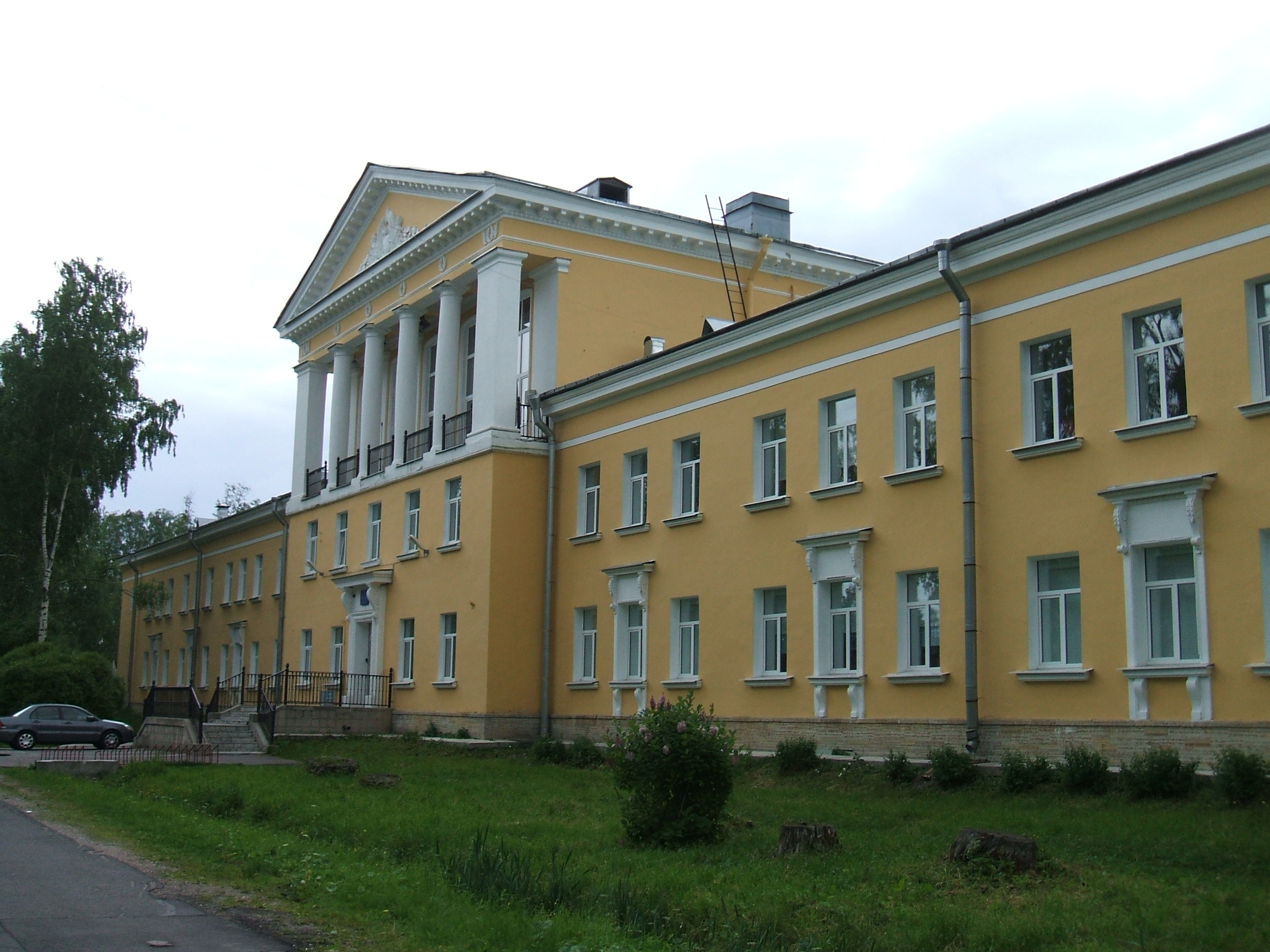 Средняя общеобразоватеьня государственная Школа №440 в п.Ольгино СПб